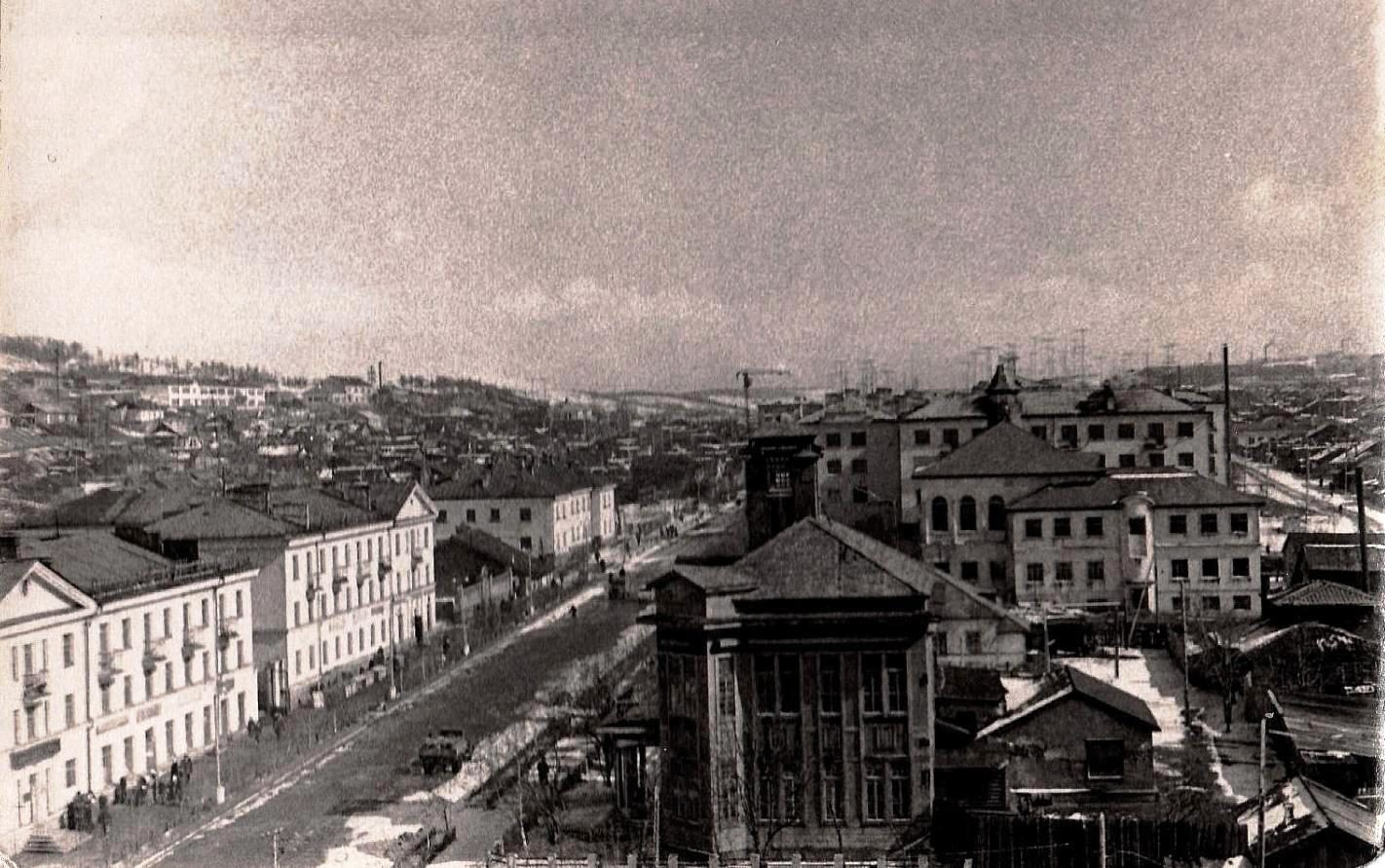 Вид центральной части города Корсаков (Сахалинская область) в 1960 году